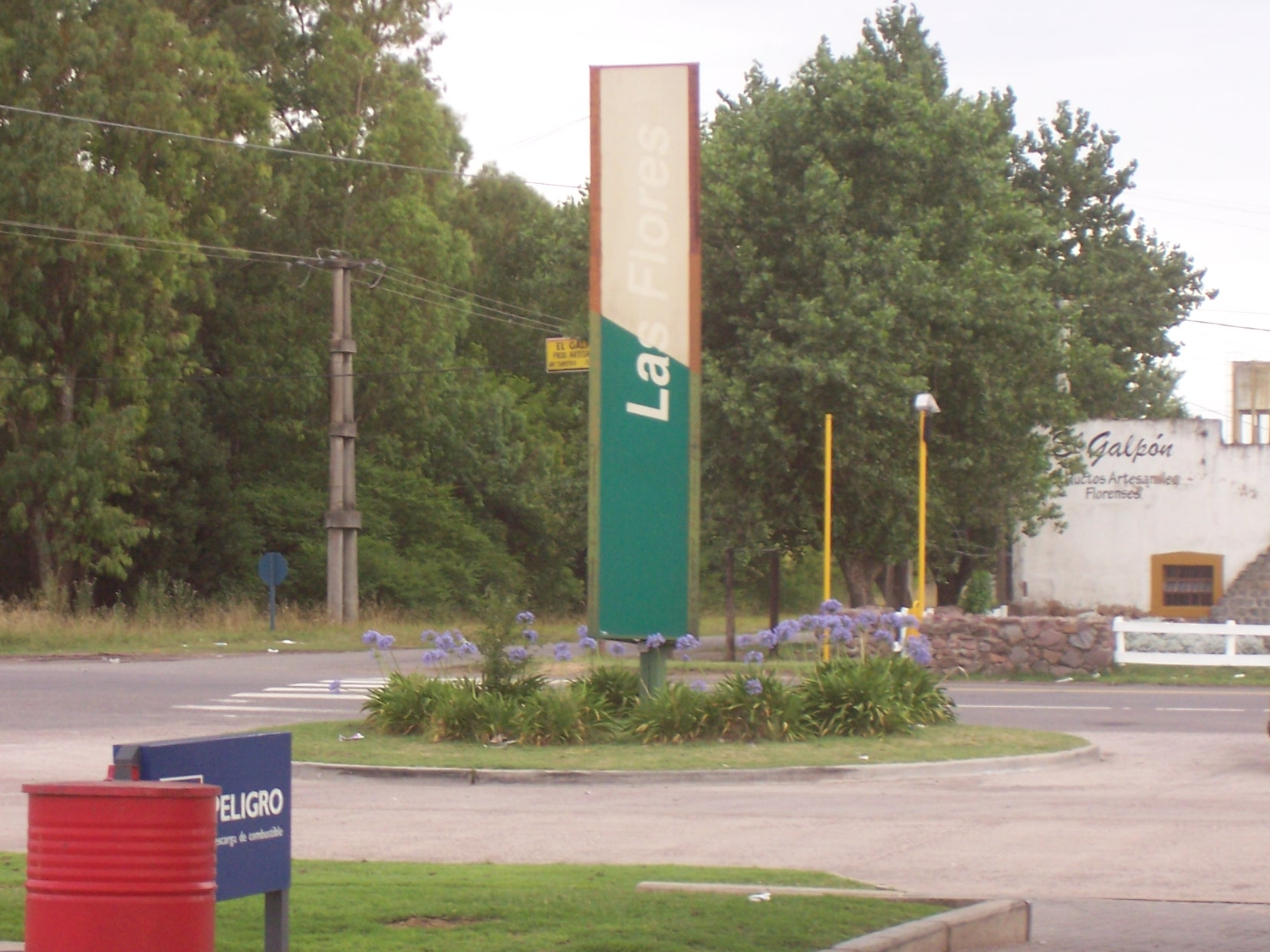 Entrada a la ciudad de Las Flores, sobre la ruta nacional n°3, en la provincia de Buenos Aires, Argentina.